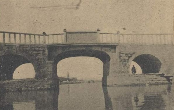 惠州西湖圆通桥 旅行杂志 1937 年 第11卷 第3 期